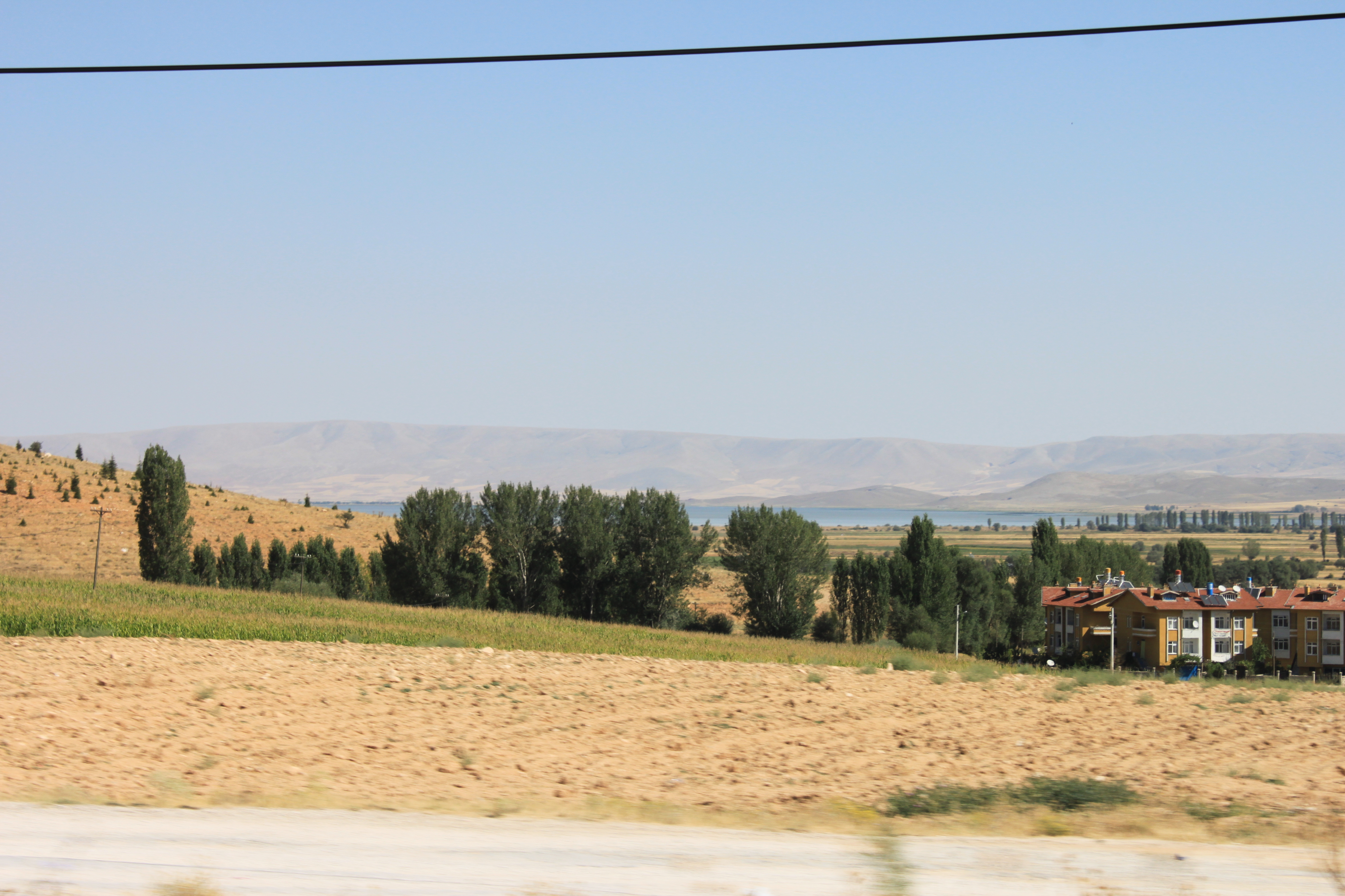 See in der Türkei